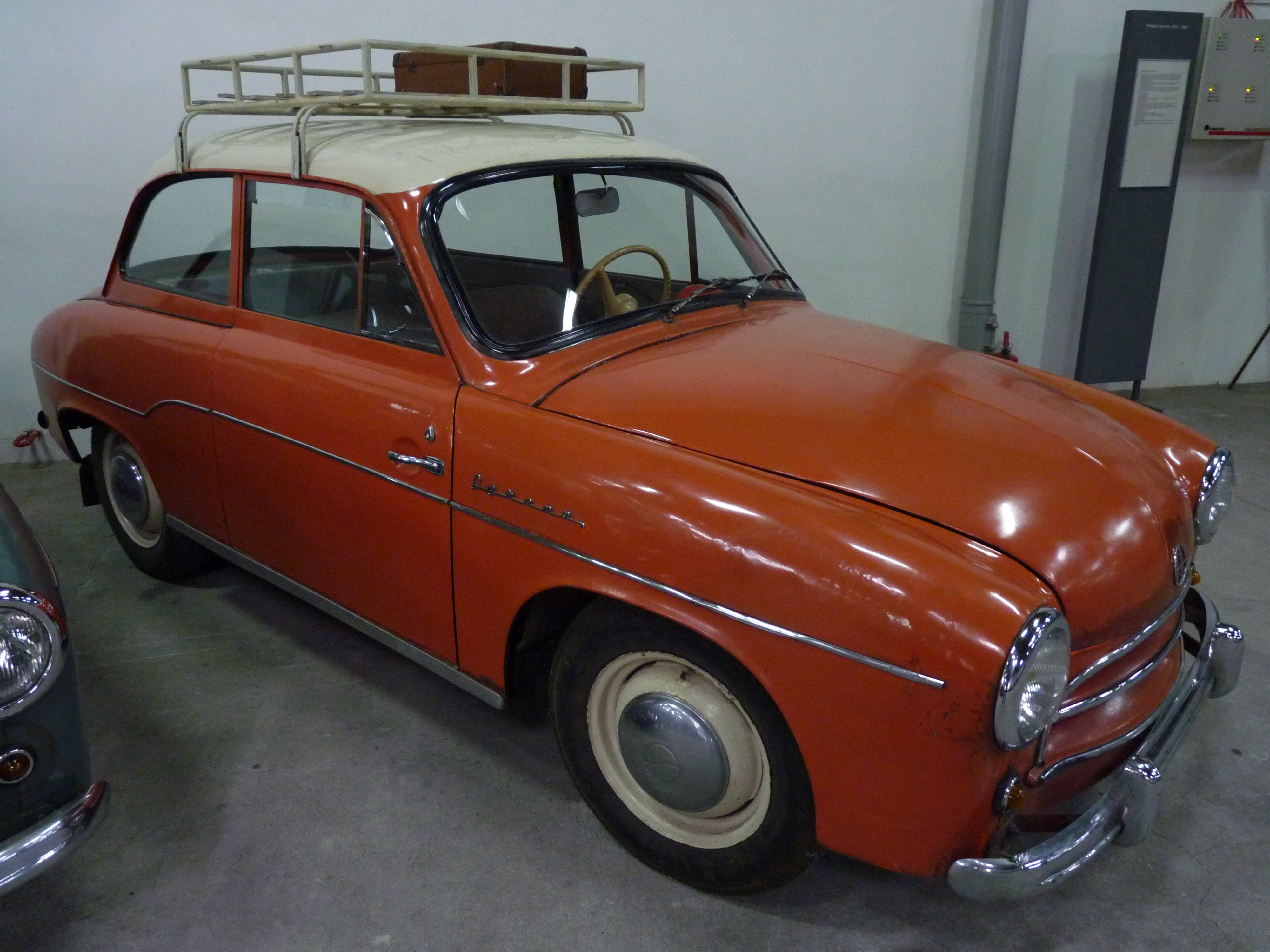 FSO Syrena 101 in Muzeum Inżynierii Miejskiej in Kraków.